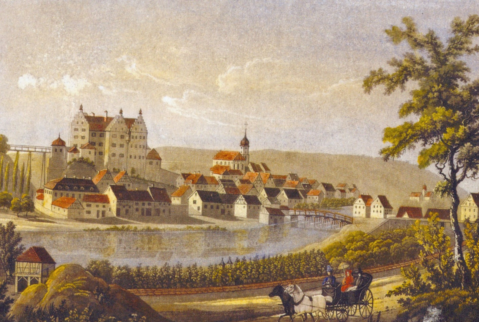 Stadt Scheer mit dem Schloss der Fürsten von Thurn und Taxis Farblithografie